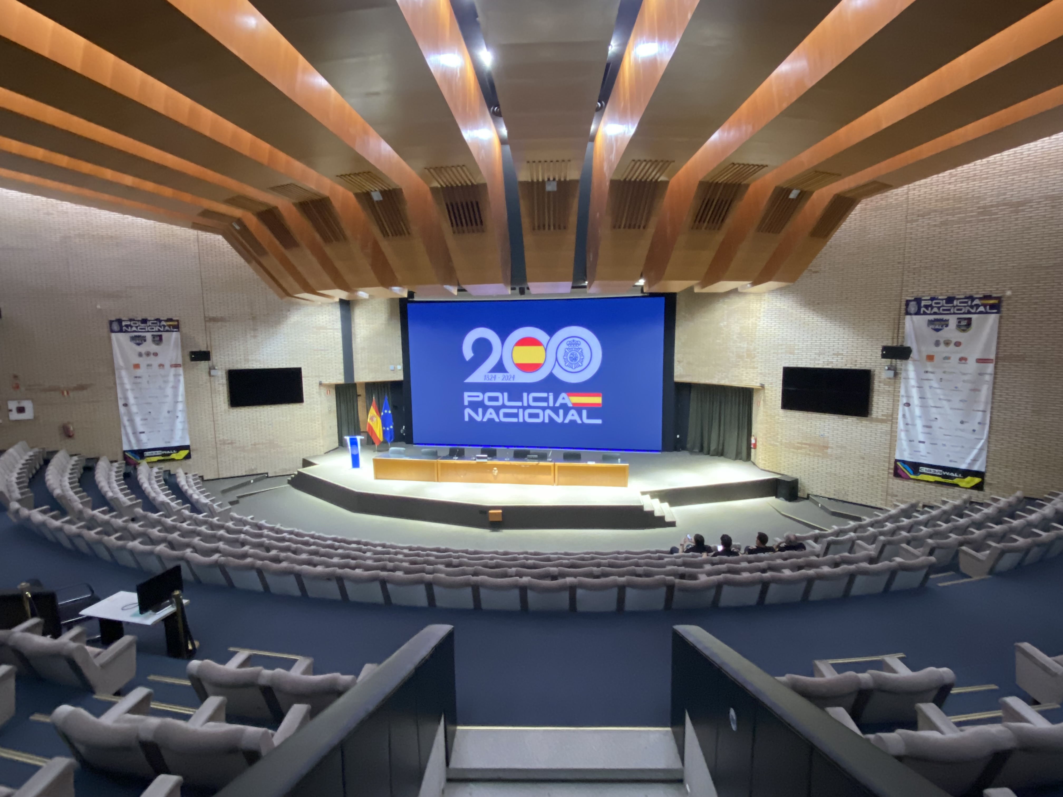 Auditorio